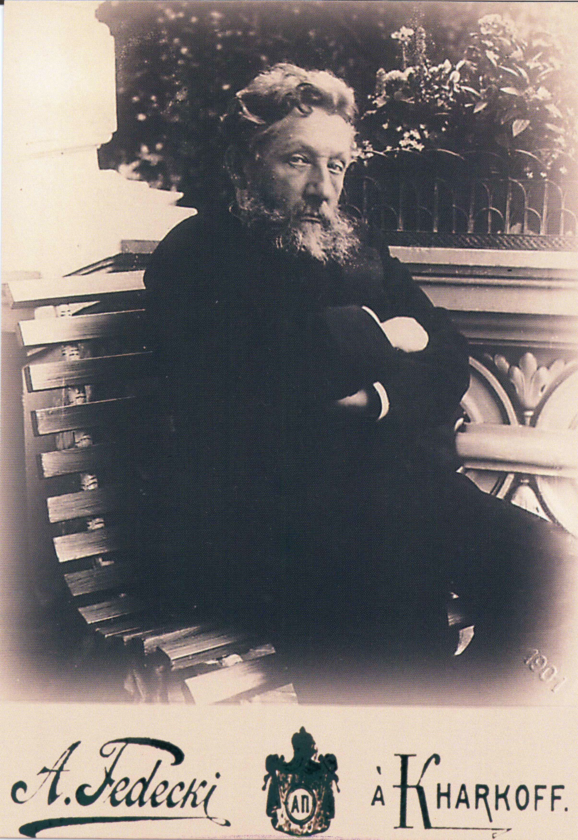 Фотограф Альфред Федецкий. Портрет Алексея Кирилловича Алчевского весной 1901 года перед его гибелью, последовавшей 7 мая 1901. Фотопортрет работы А. Федецкого. Харьков.